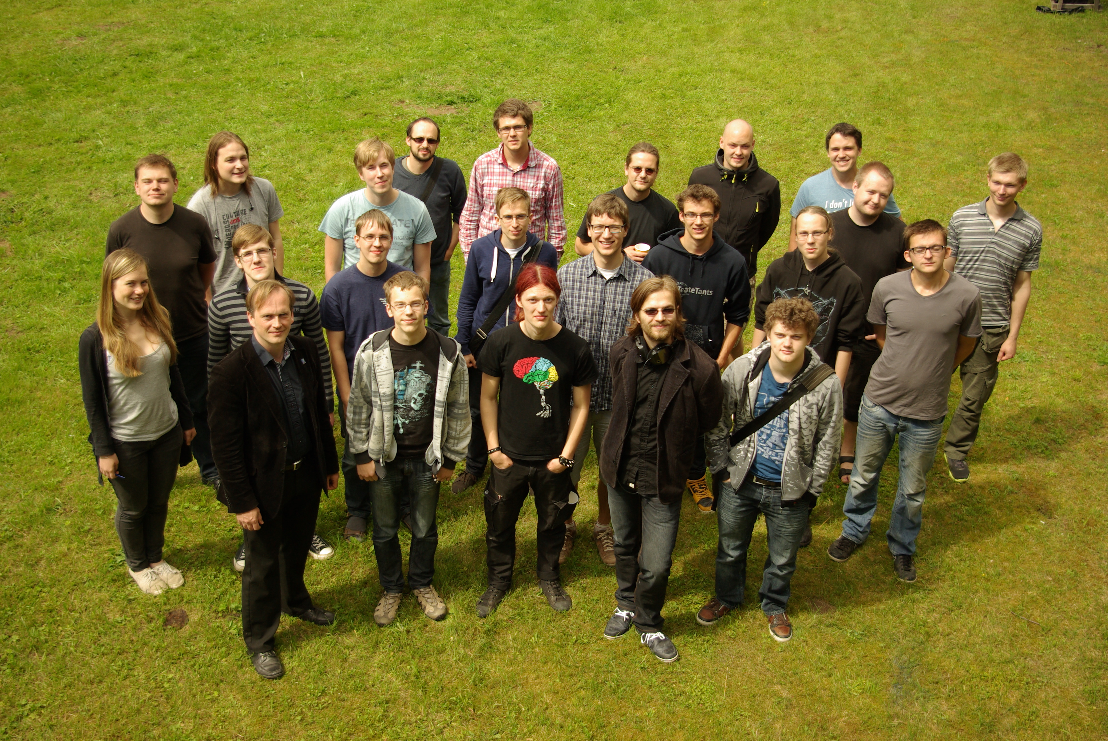 Eesti tudengisatelliidi ESTCube-1 tiimi liikmed ESTCube X seminaril Eesti Füüsika Seltsi täppisteaduste suvekoolis 28. juunil 2012 Koppra talus Viljandimaal